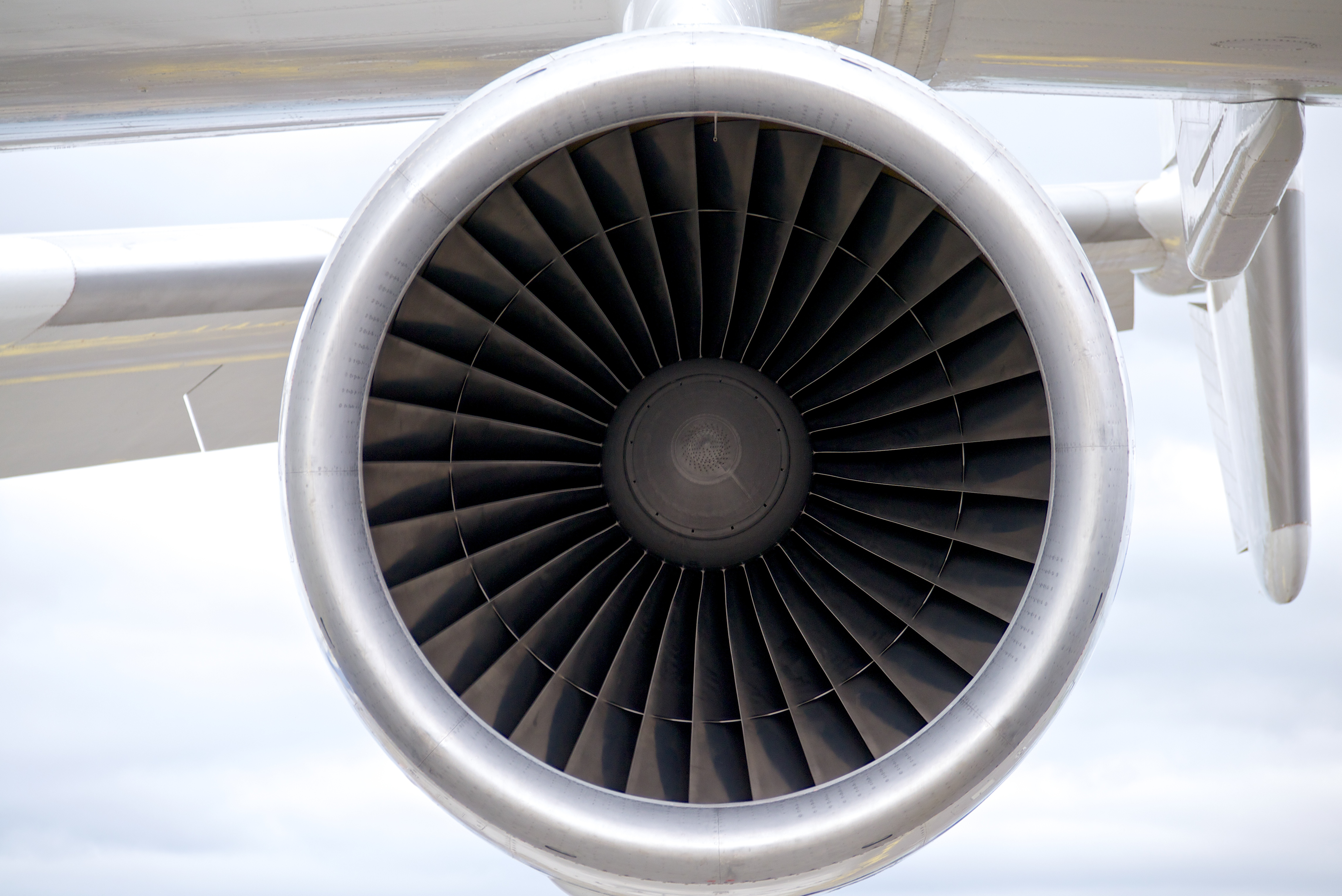 Antonov An-225 Mriya